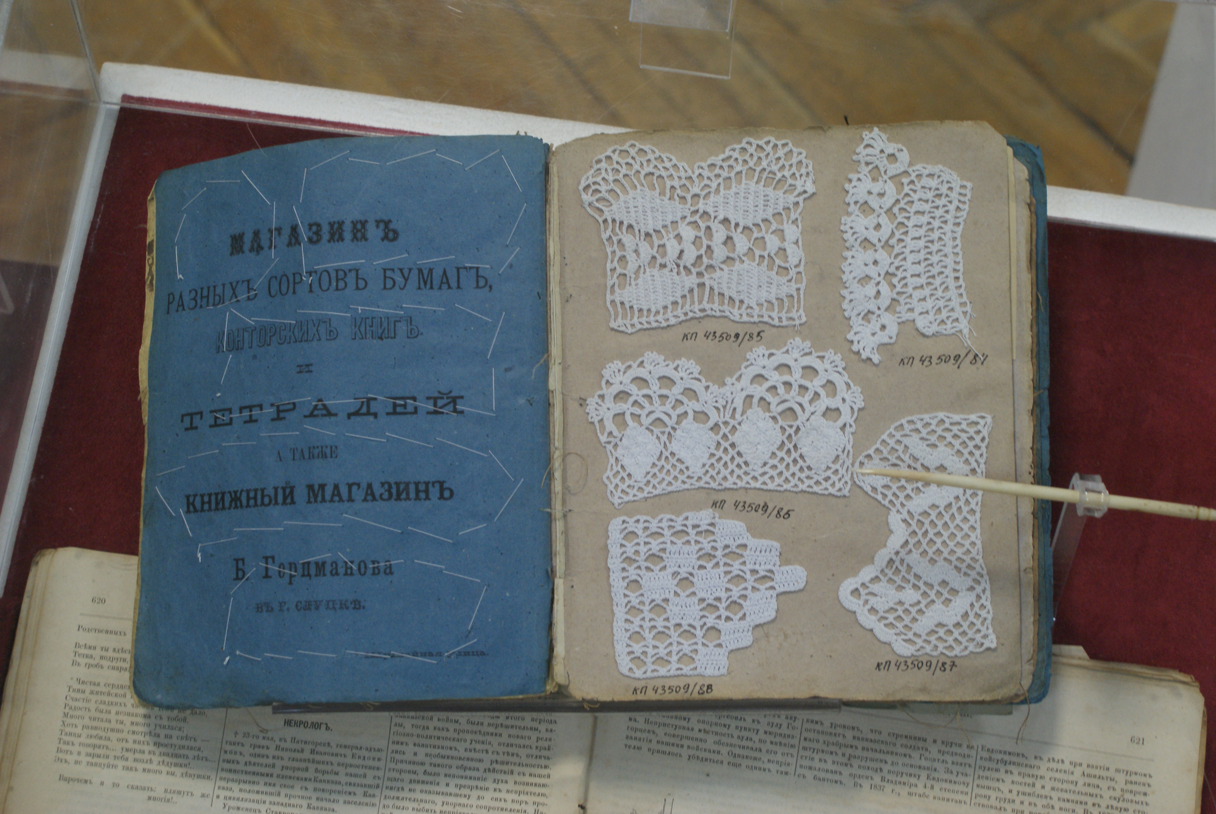 Сшытак з узорамі карункаў В. Муратавай, вучаніцы Слуцкай гімназіі. 1913 г.